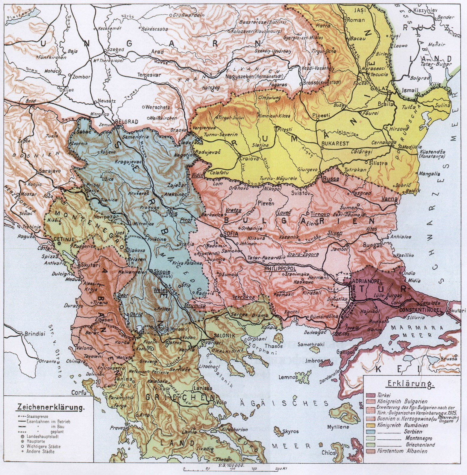 Автор:Димитър Ризов (1862-1918) Поправката на границата според българо-турския договор от 1915 година. Карта от атласа на Димитър Ризов "Българите в техните исторически етнографически и политически граници", Берлин, 1917.